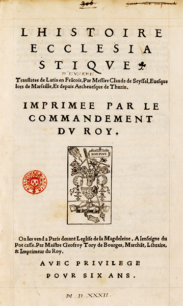 Achevé d'imprimer d'une ordonnance du roi